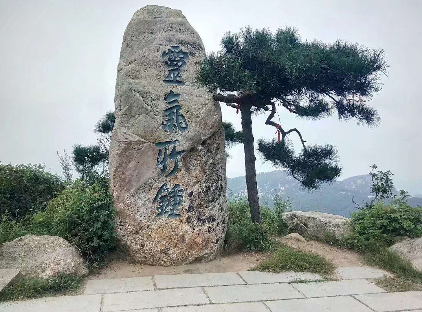 中文（中国大陆）: 临朐灵气所钟石